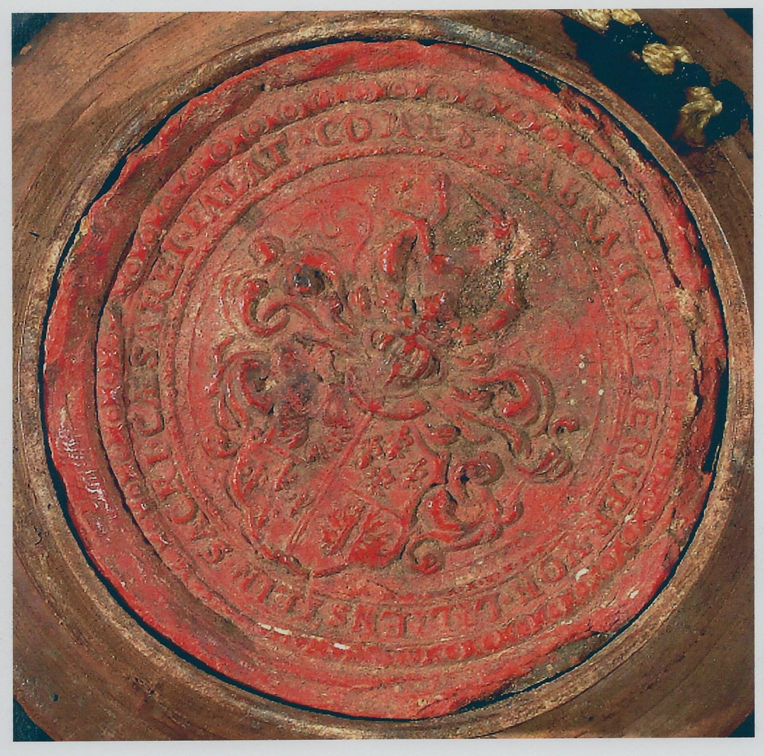 Rotes Siegel des Abraham Gerner von Lilienstein zum Wollenberg, kaiserlicher Pfalzgraf, B8 Urkunde der Herrschaft Schlitz 6/206 , 1664 Juli 12, aus Repertorien des hessischen Staatsarchivs Darmstadt, Stand: August 2006